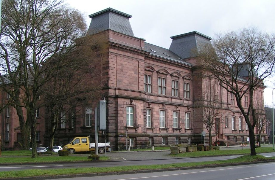 Rheinisches Landesmuseum Trier